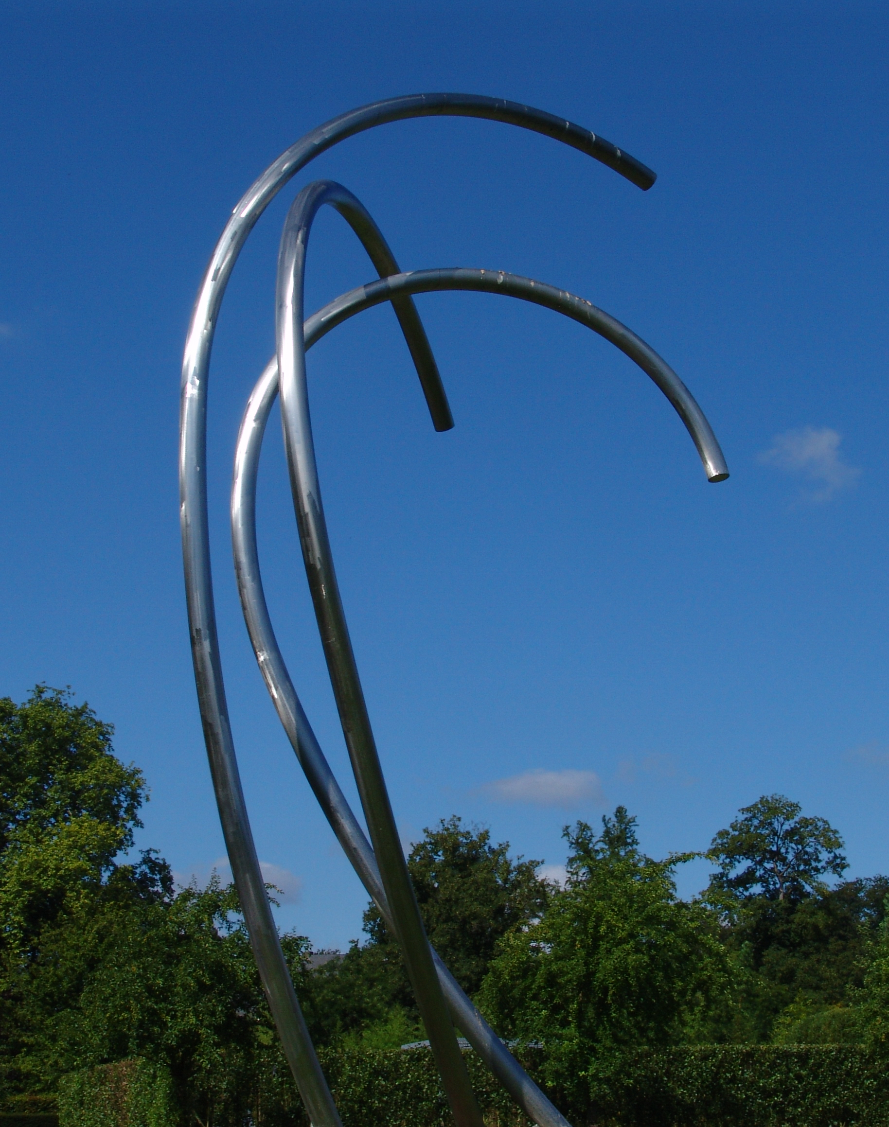 Beate Schroedl-Baurmeister, Im Sturm, 610x300x340 cm, Edelstahl, während einer Ausstellung in Schloss Dyck, Jüchen